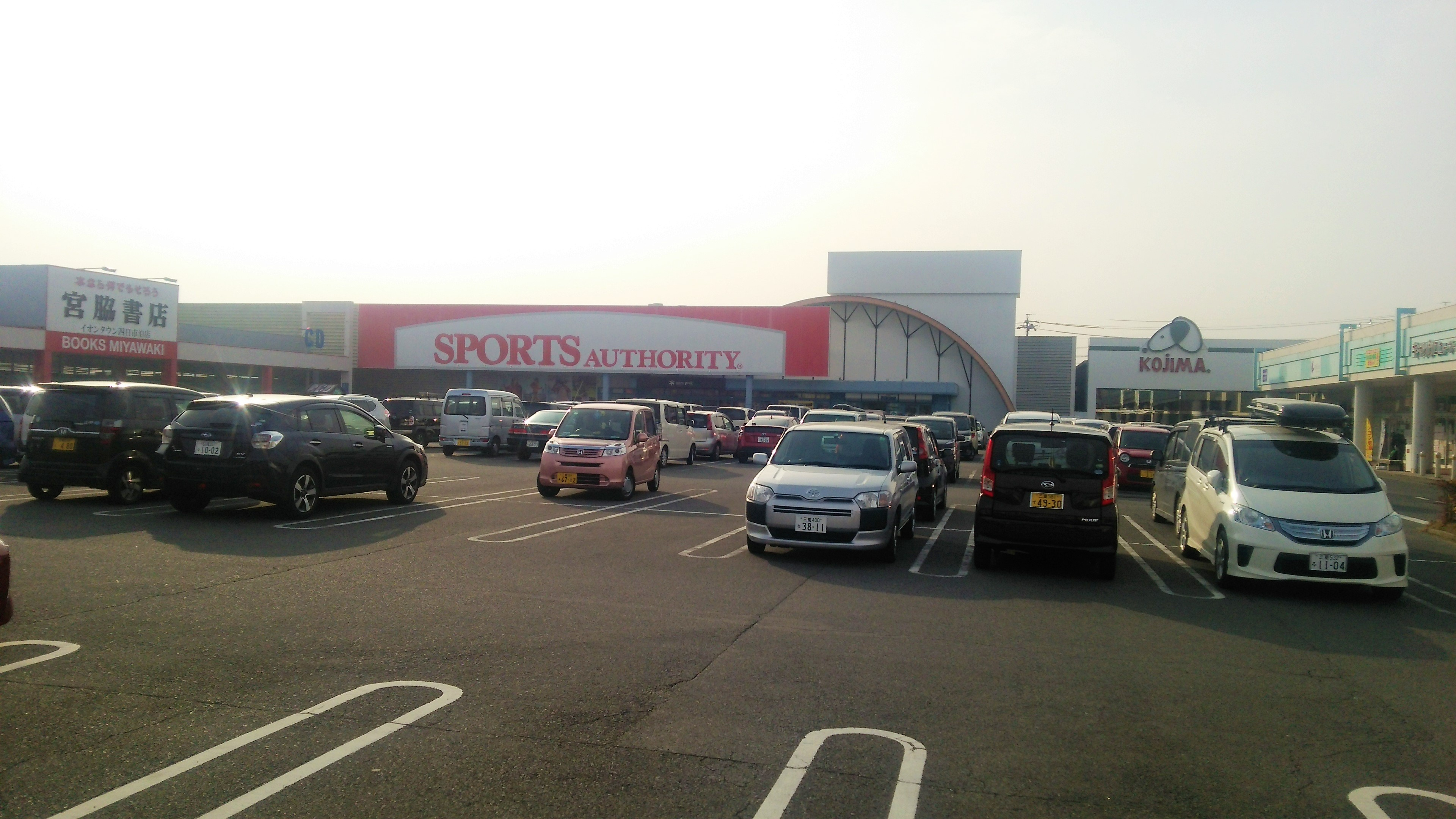 スポーツオーソリティイオンタウン四日市泊店 (閉店済み)